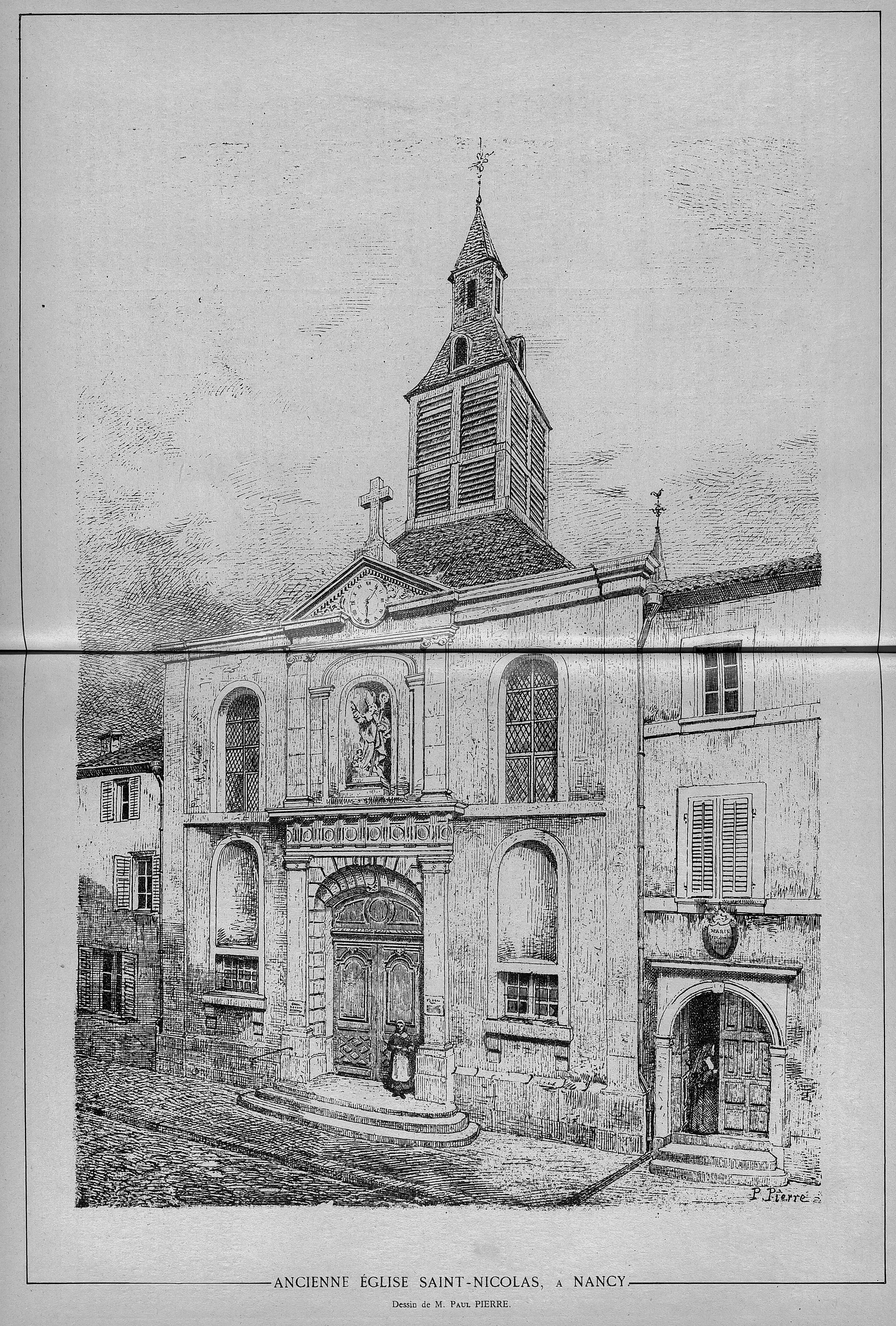 Extrait de Nancy artiste du dimanche 7 août 1887, fascicule n° 31